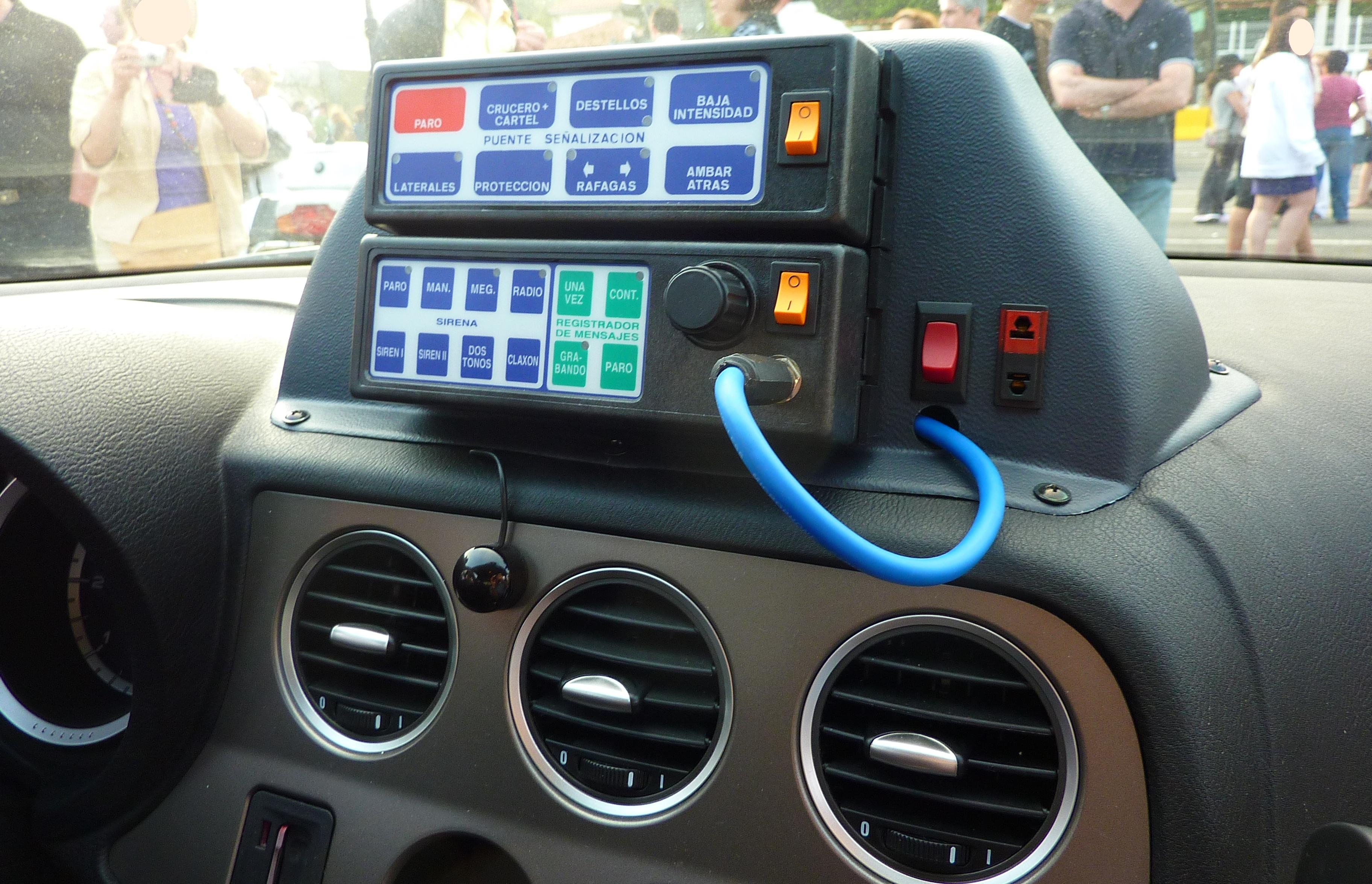 Alfa Romeo 159 de la Guardia Civil de Tráfico.